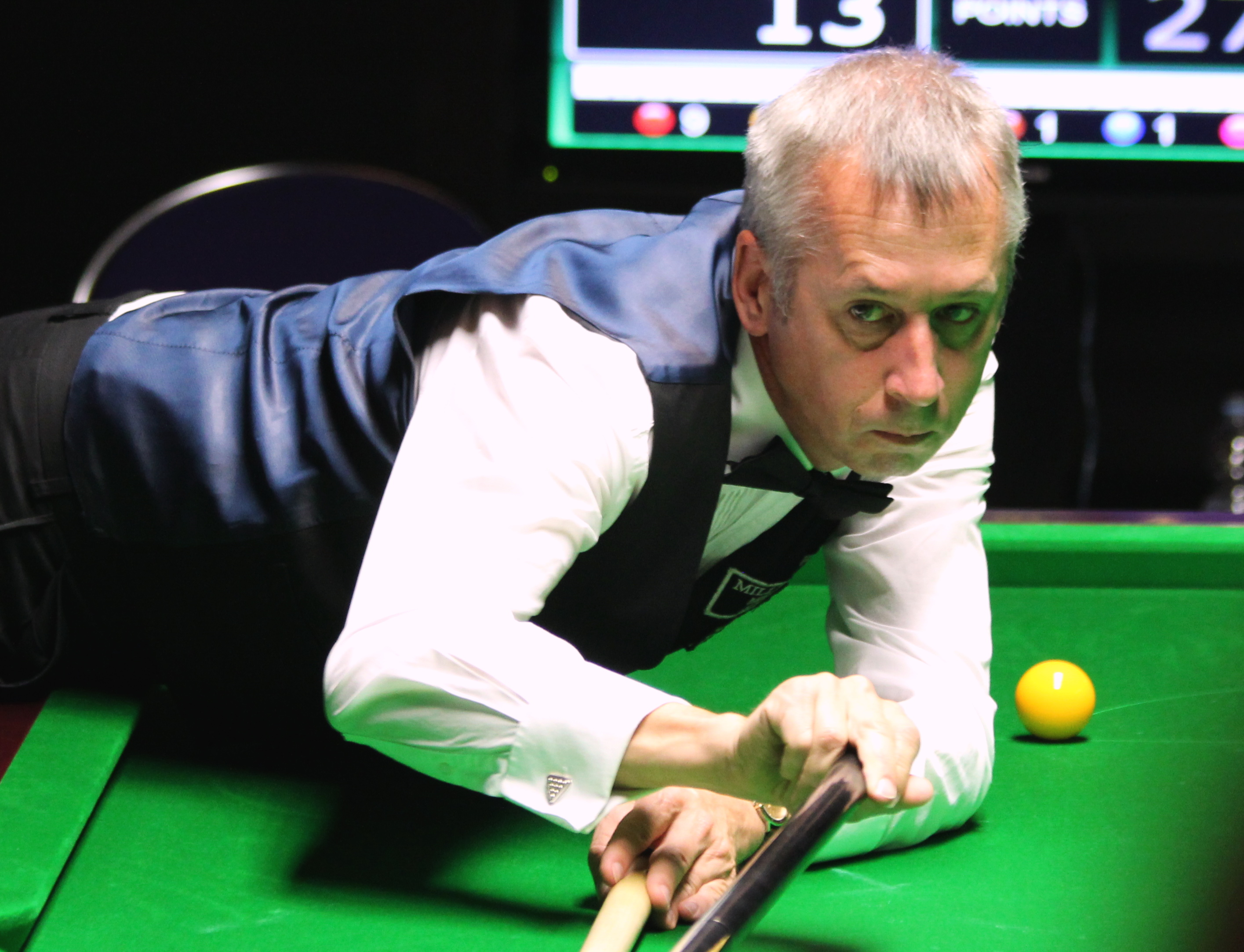 Nigel Bond beim Paul Hunter Classic 2016